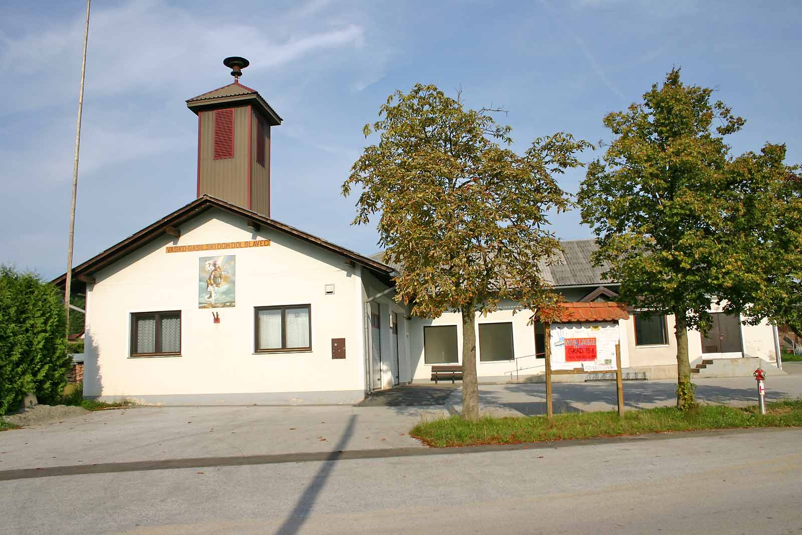 Prostovoljno gasilsko društvo Dolnji Slaveči. Volunteer fire Dolnji Slaveči. Freiwillige Feuerwehr Dolnji Slaveči.